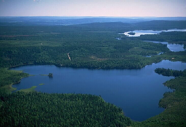 Stor- och Lill Åbodsjön i Örnsköldsviks kommun i Ångermanland i Sverige.